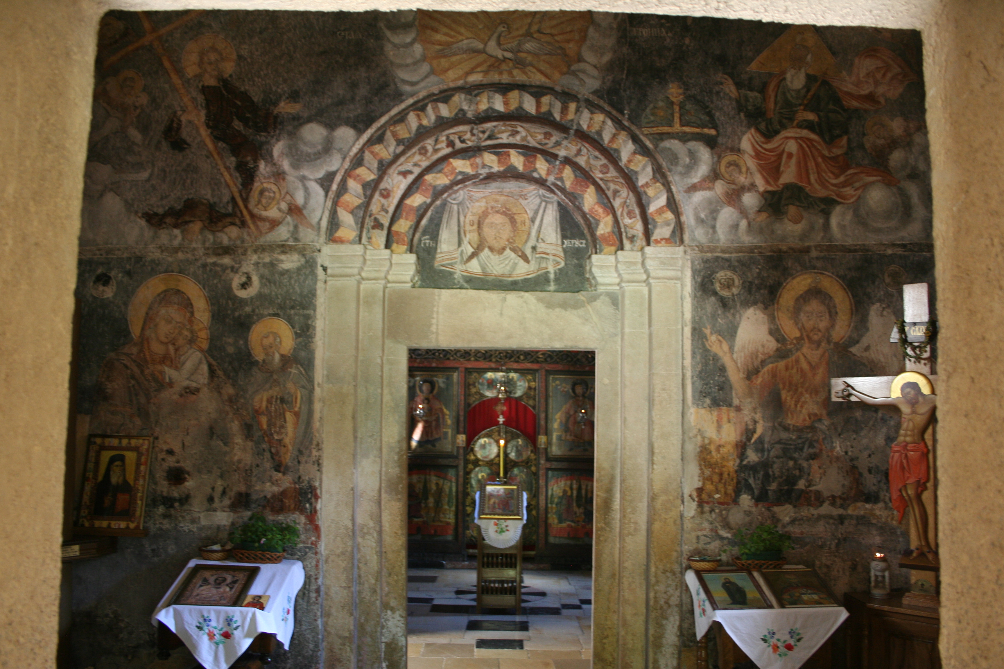 Manastir Tronoša